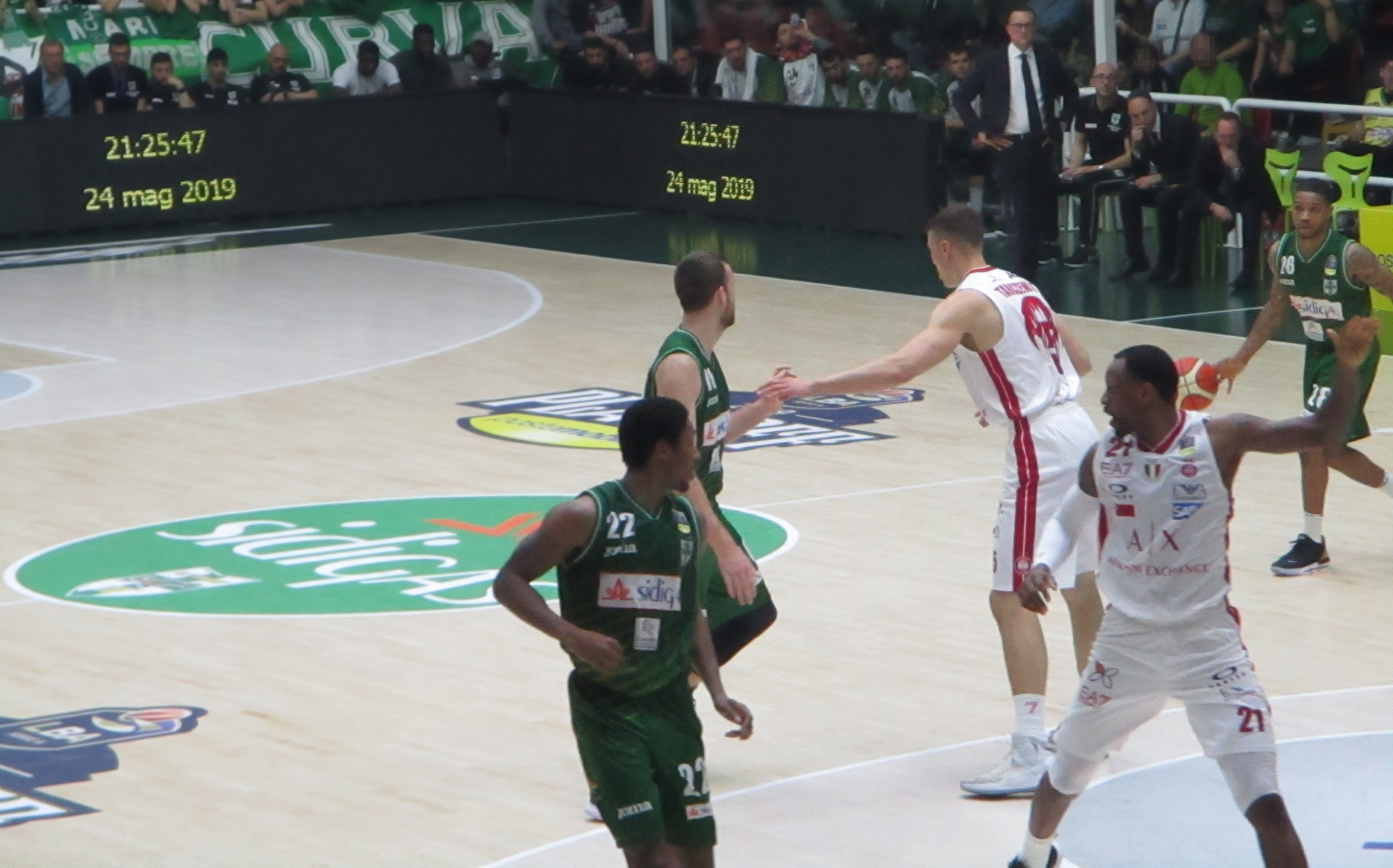 Fase di gioco dell'incontro gara 4 dei play-off Società Sportiva Felice Scandone - Pallacanestro Olimpia Milano del 24/05/2019 disputato presso il Palasport Giacomo Del Mauro di Avellino e terminato 80-86